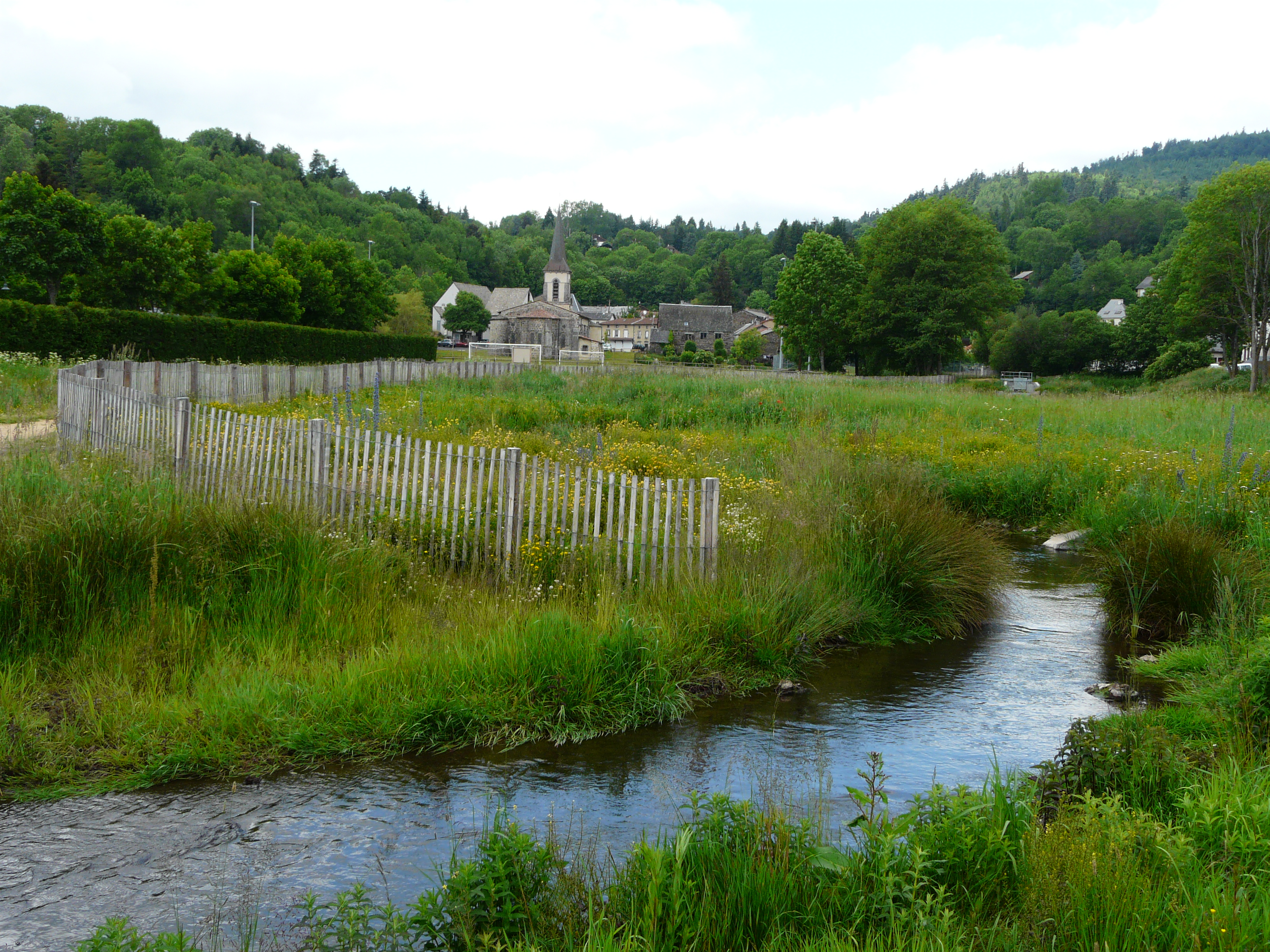 La Veyre traverse la zone humide du lac d'Aydat, Aydat, Puy-de-Dôme, France. Au fond, le village d'Aydat.